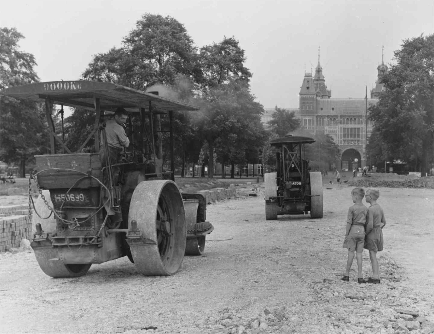 Jongens kijken naar de stoomwalsen bij de aanleg van de nieuwe weg op het Museumplein, 5 augustus 1953 Foto Ben van Meerendonk / AHF, collectie IISG, Amsterdam